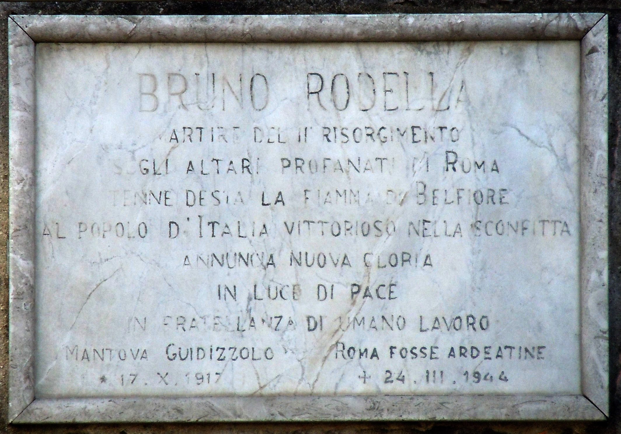 Guidizzolo, lapide a Bruno Rodella, martire delle Fosse Ardeatine.